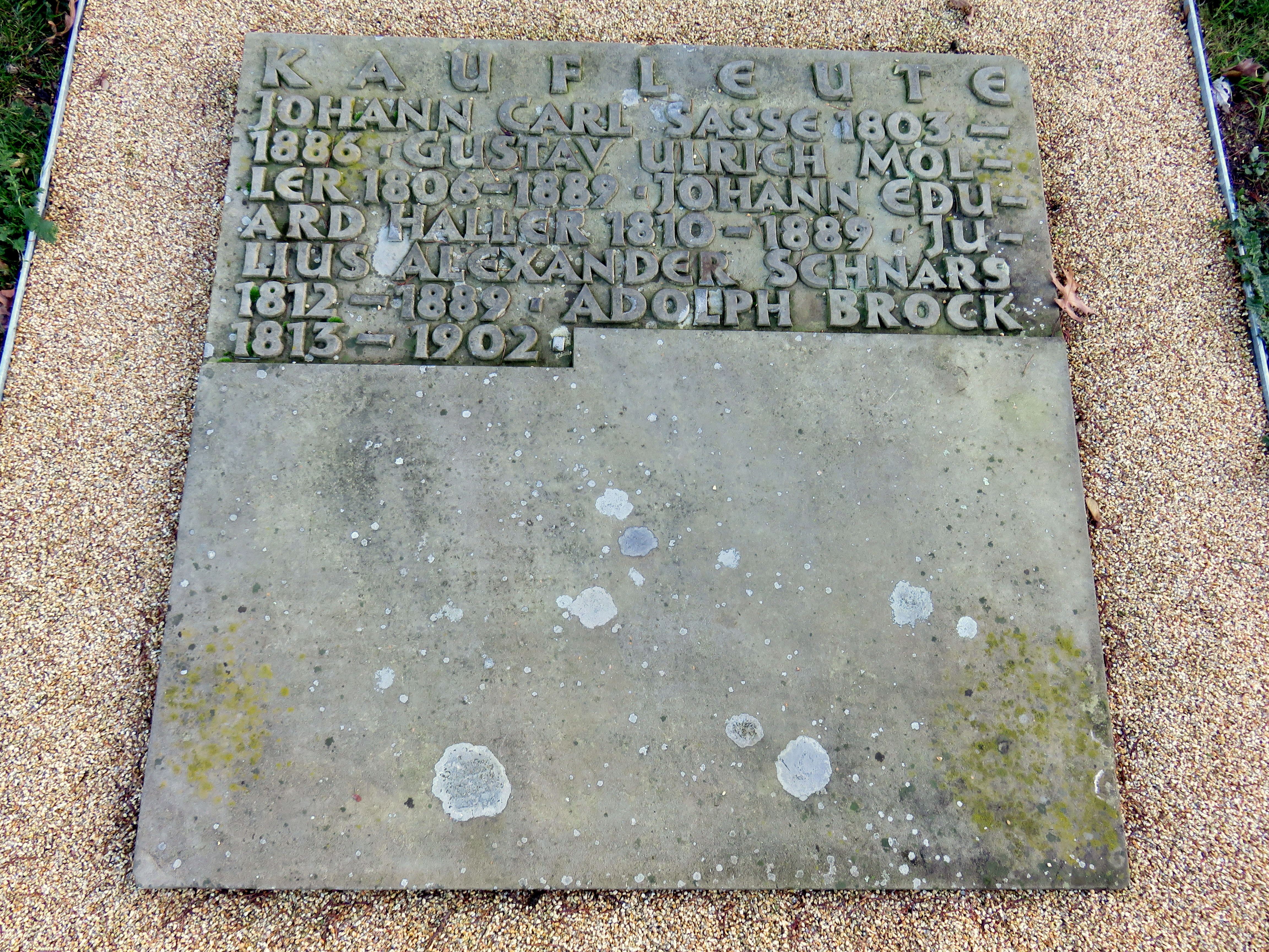 Sammelgrabplatte Kaufleute (II d) im Bereich des Althamburgischen Gedächtnisfriedhofs auf dem Hamburger Friedhof Ohlsdorf, zu Ehren von unter anderen Julius Alexander Schnars.